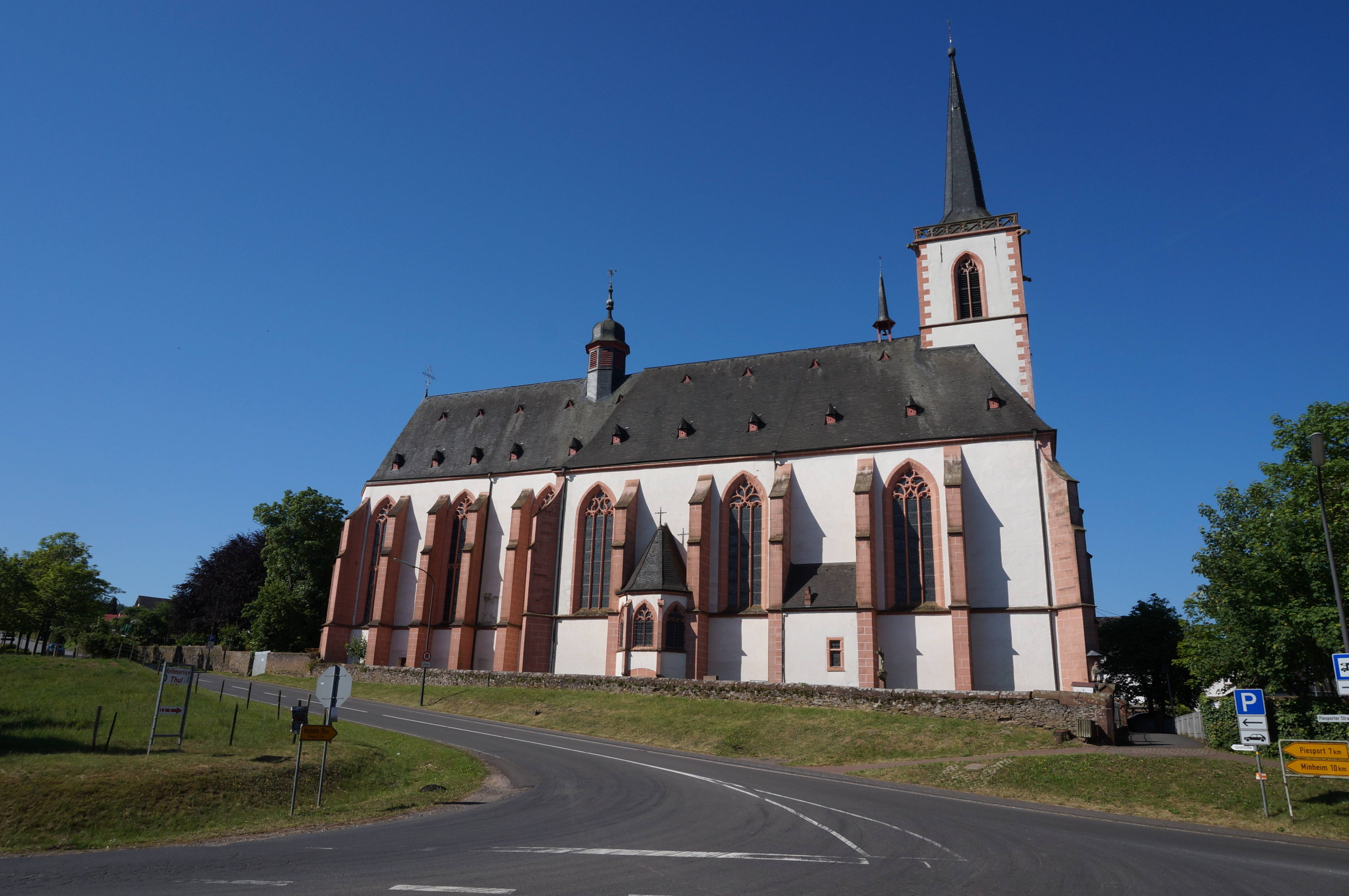 Wallfahrtskirche "Maria Heimsuchung" Klausen (Kreis Bernkastel-Wittlich)